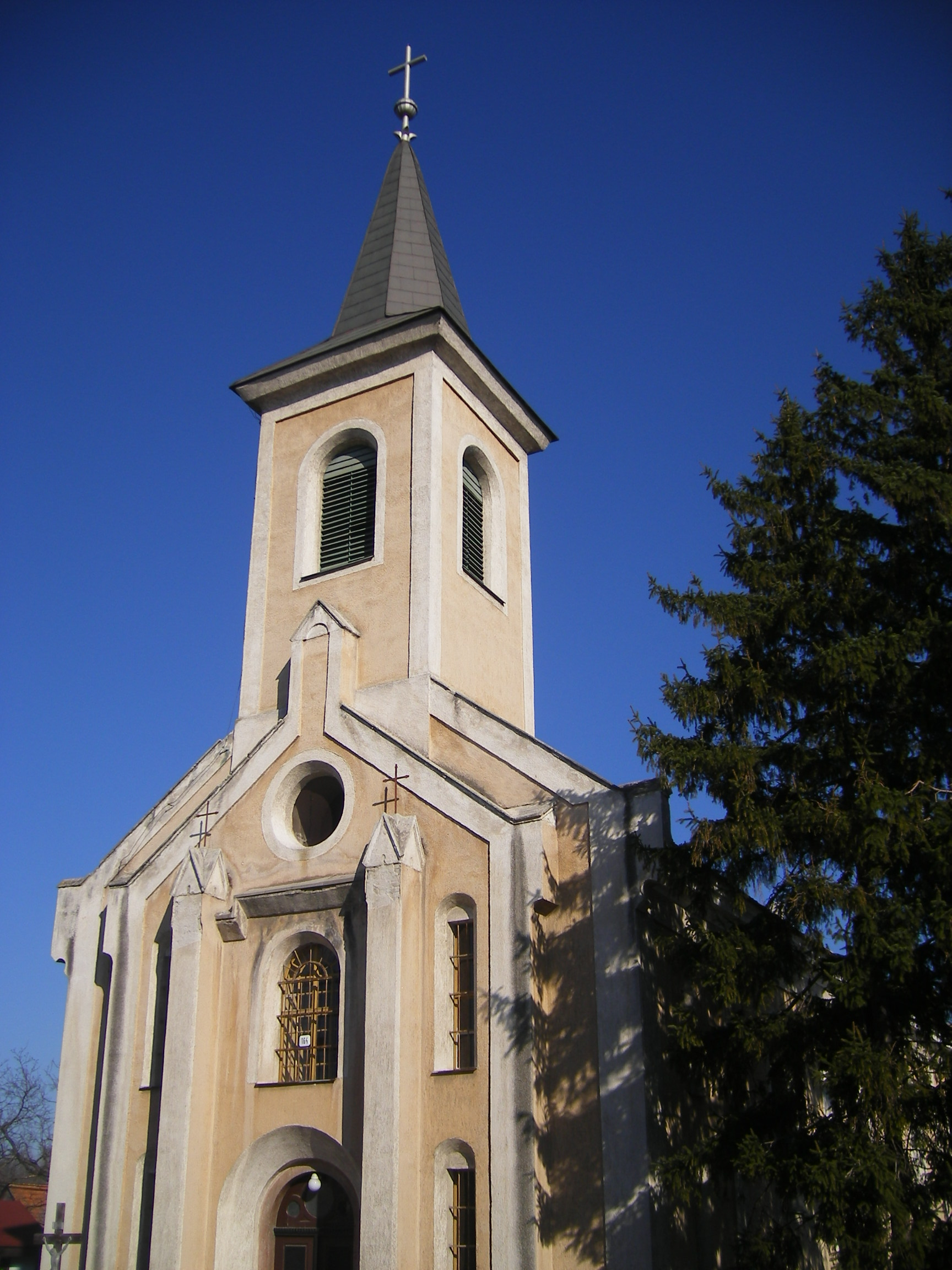 Keszegfalva, római katolikus templom